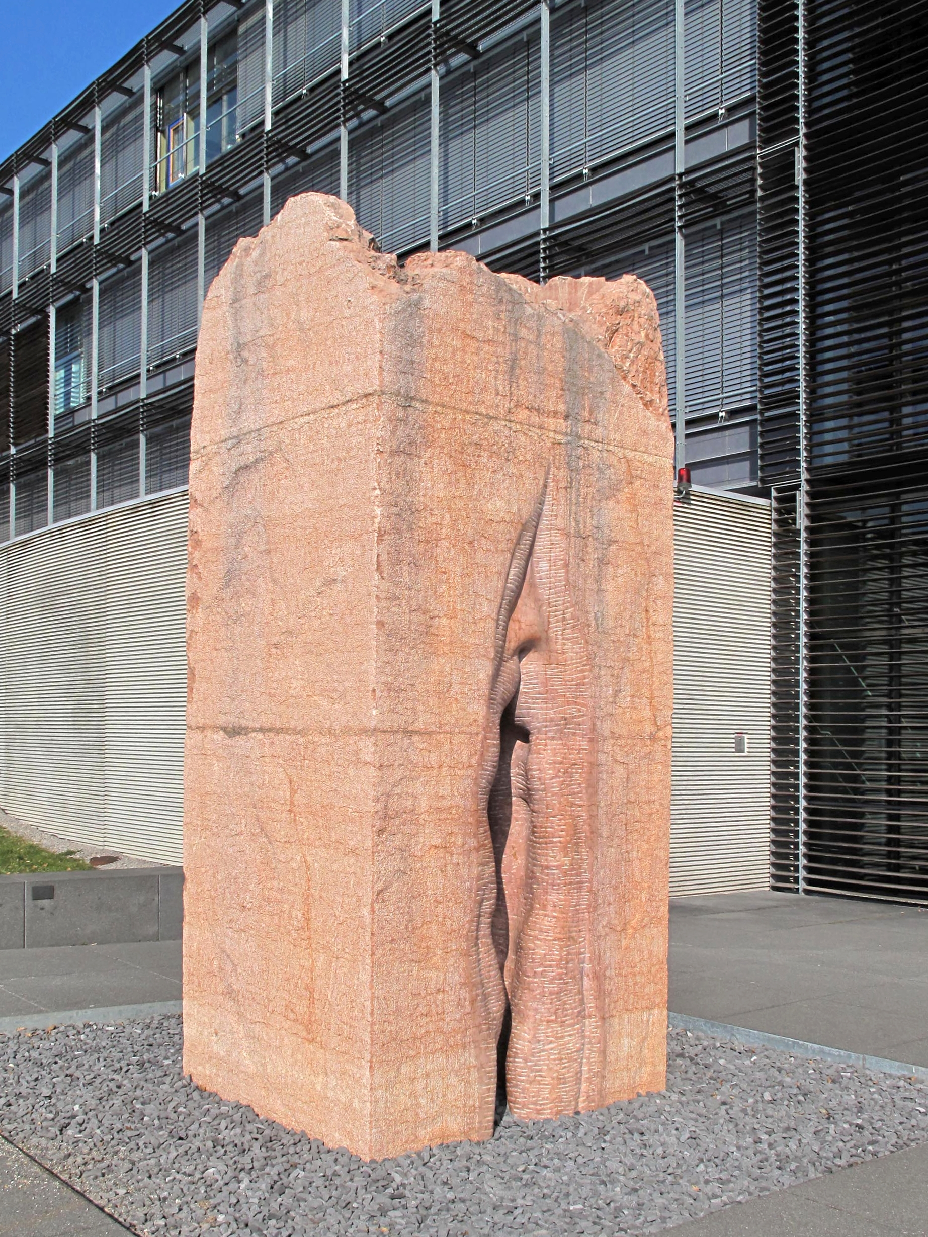 Fernando de la Jara, Checan ("Chacán-Pi"), 2002, - Deutschland, Baden-Württemberg, Tübingen, Elfriede-Aulhorn-Straße 6, vor dem Institut für Mikrobiologie und Virologie